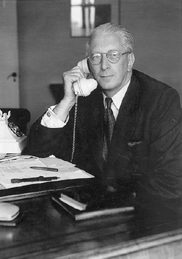 Frederick Sidney Cotton OBE (* 17. Juni 1894 in Allensleigh, bei Bowen, Queensland in Australien; † 13. Februar 1969 in East Grinstead, Sussex, Großbritannien) war ein australischer Pilot, Luftfahrtpionier, Spion und Fotograf. Im Ersten Weltkrieg erfand er einen Fliegeranzug, der in einem offenen Cockpit vor Unterkühlung schützte. Er war im Zweiten Weltkrieg maßgeblich an der Entwicklung der militärischen Fotogrammetrie der Briten beteiligt.